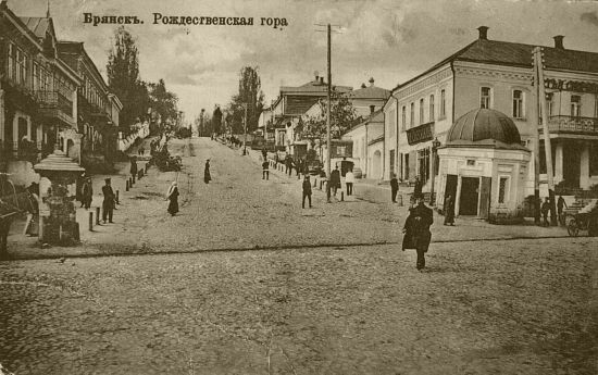 Брянск начала ХХ века. Рождественская гора (вид от Соборной площади).